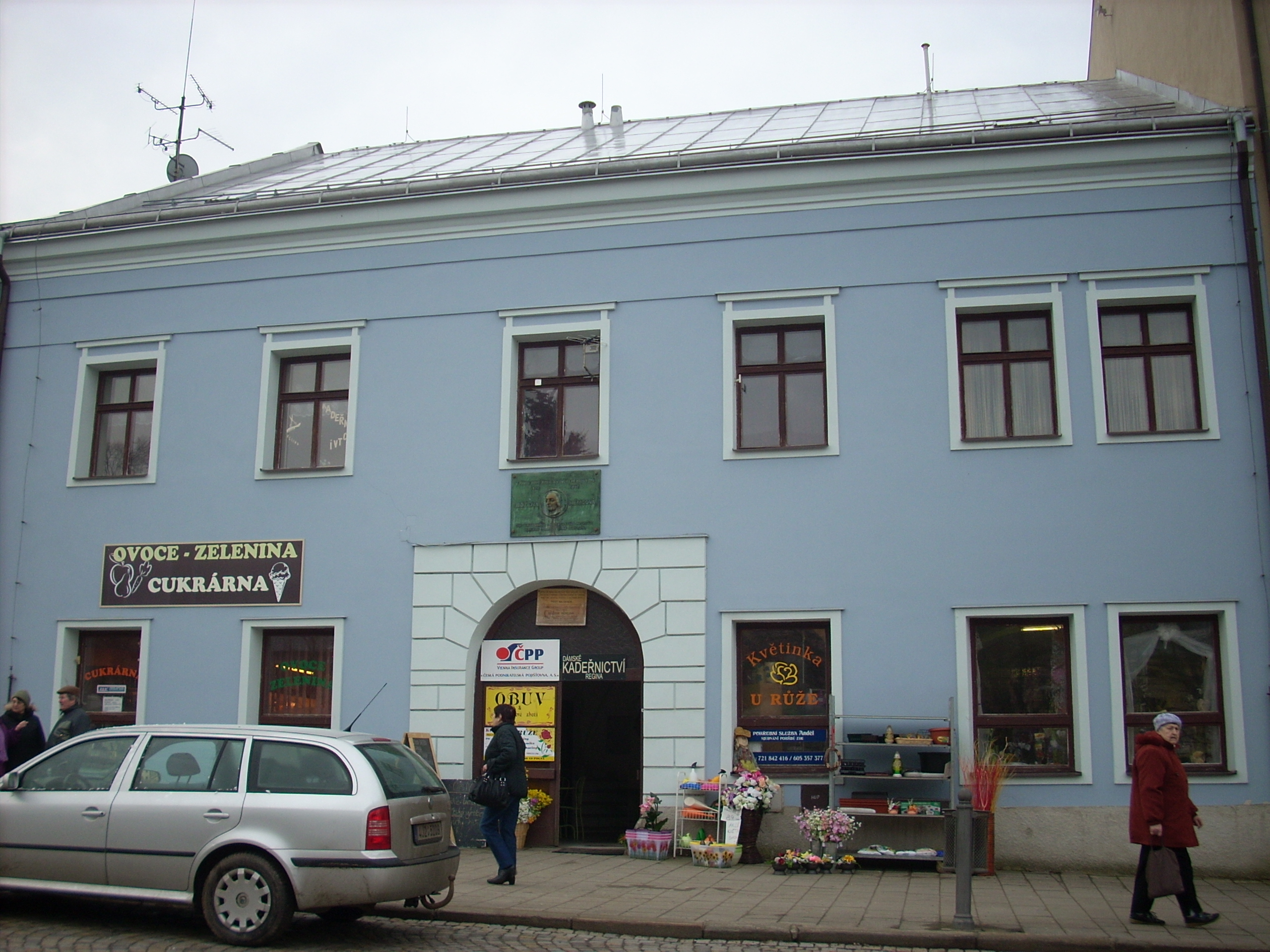 Měšťanský dům (Polná), Husovo nám. 47, Polná